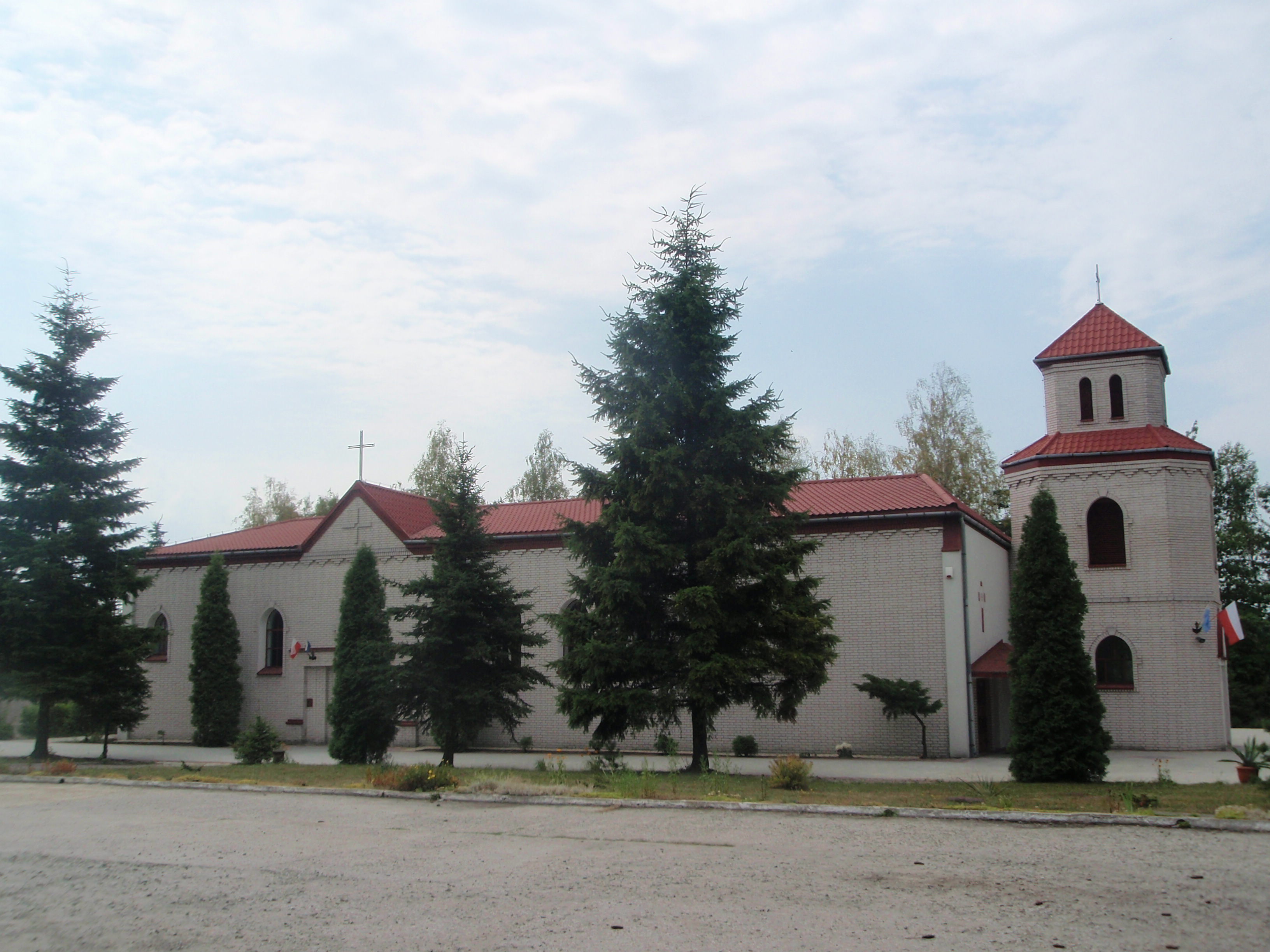 Kosciol polskokatolicki w Boleslawiu (powiat olkuski)